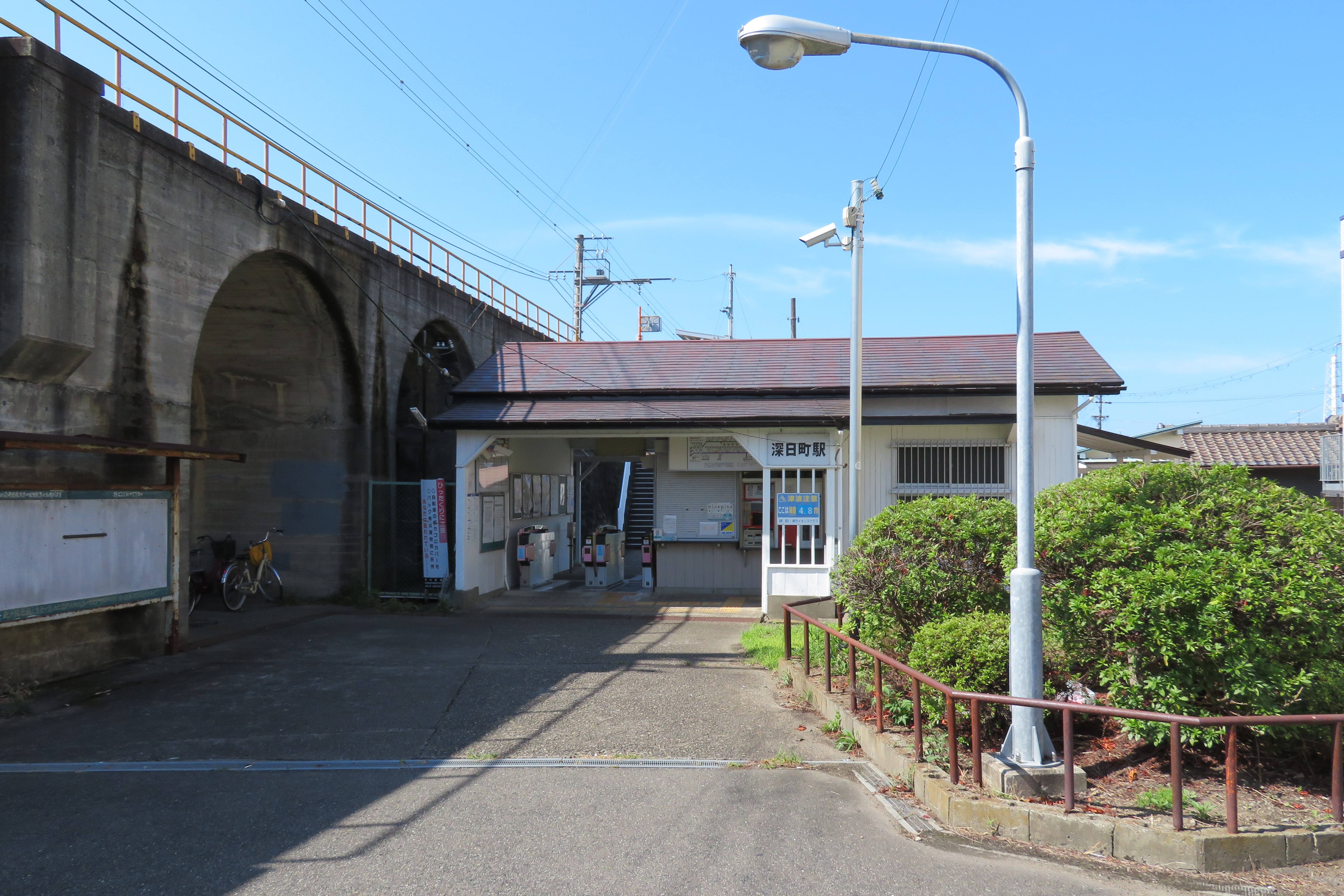 南海電鉄深日町駅